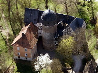 Burg Grossfurra, Sondershausen, Thüringen